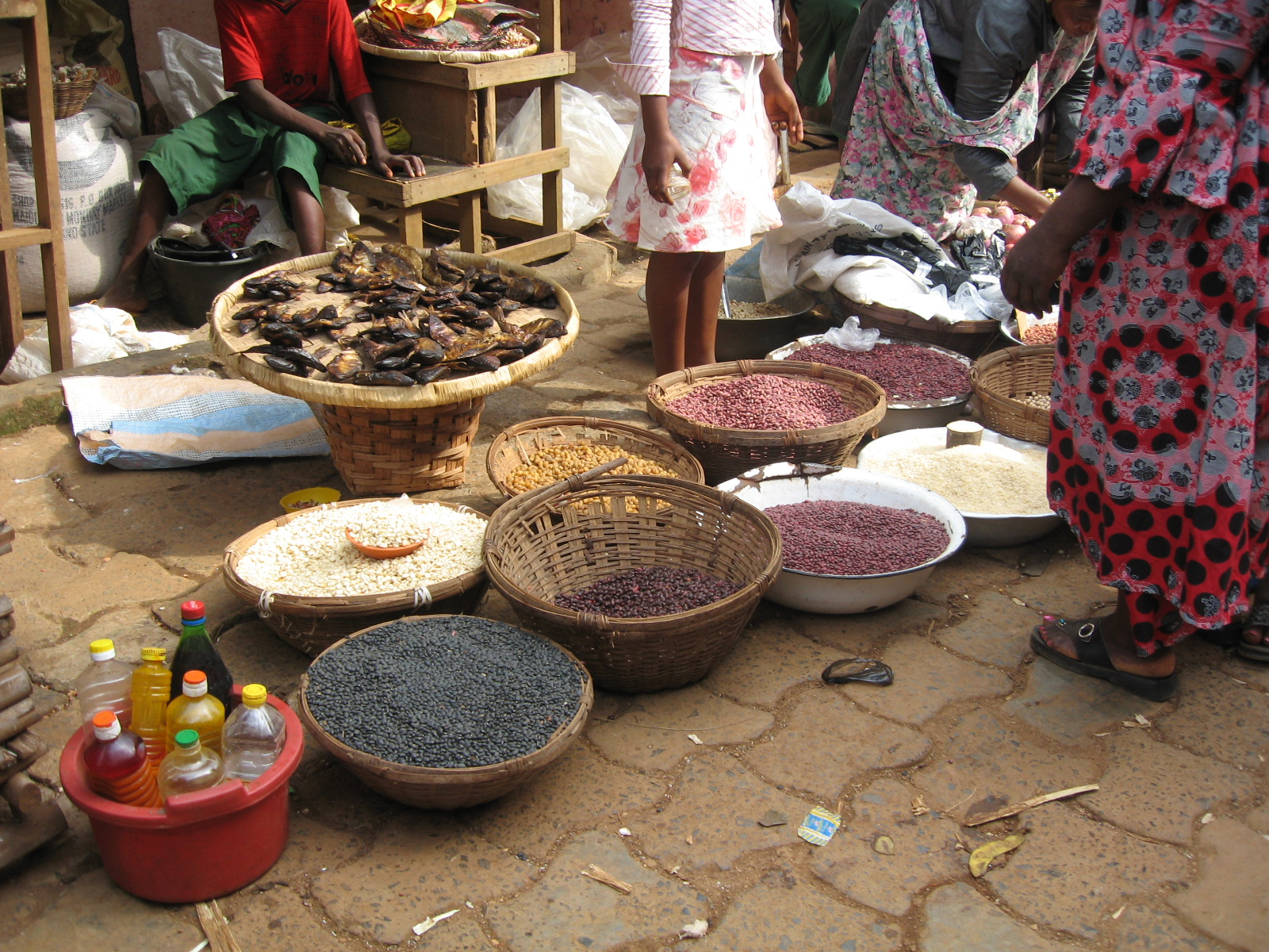 Beans, corn, rice, dried fish at Bafang Market in Cameroon/Haricots, céréales, riz, et poisson seché au marché de Bafang, Cameroun